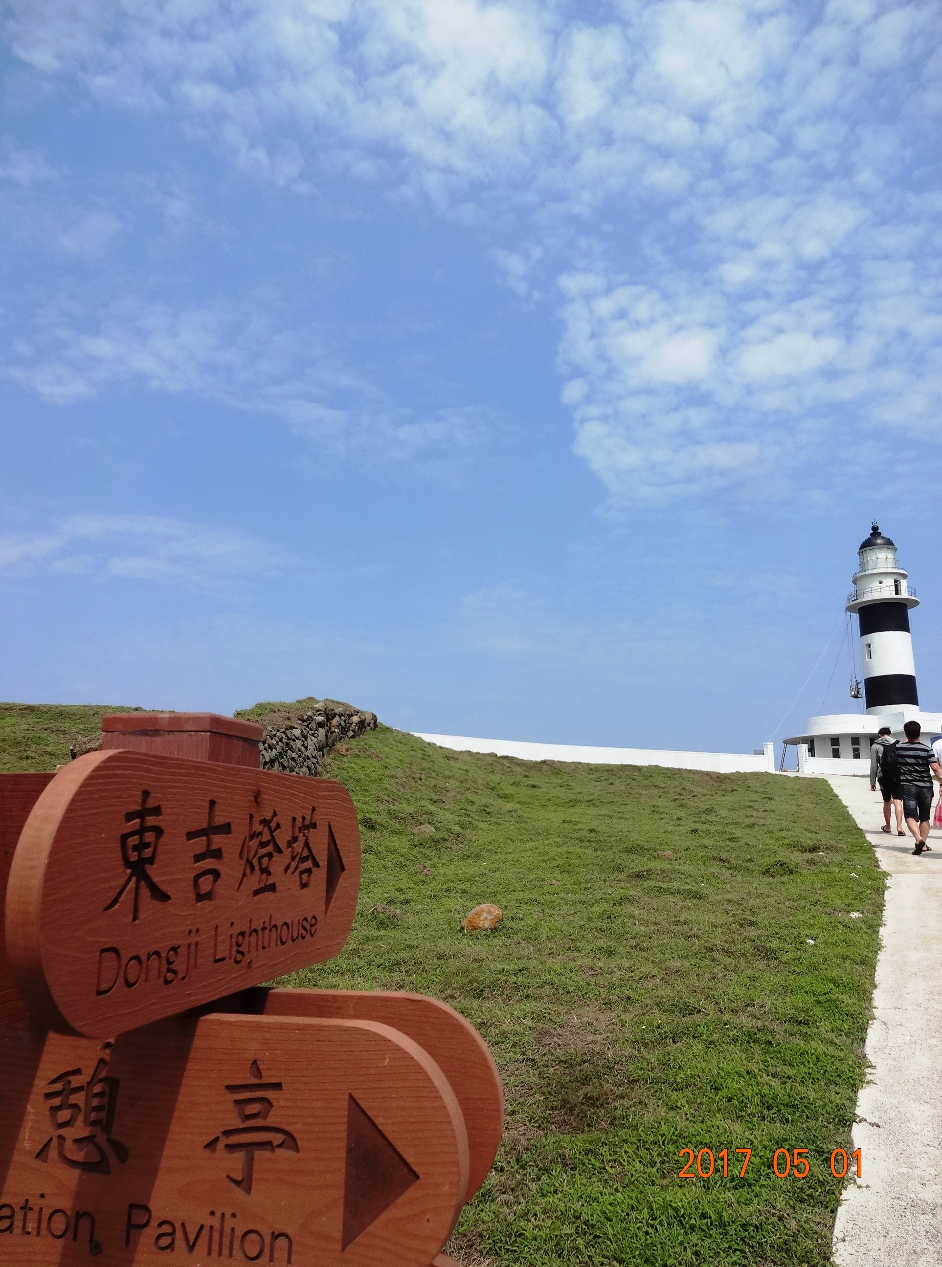 東吉之藍黑塔